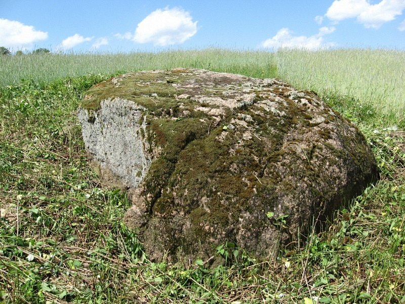 Сідляроўшчына / Студзянец. Студзянецкі валун